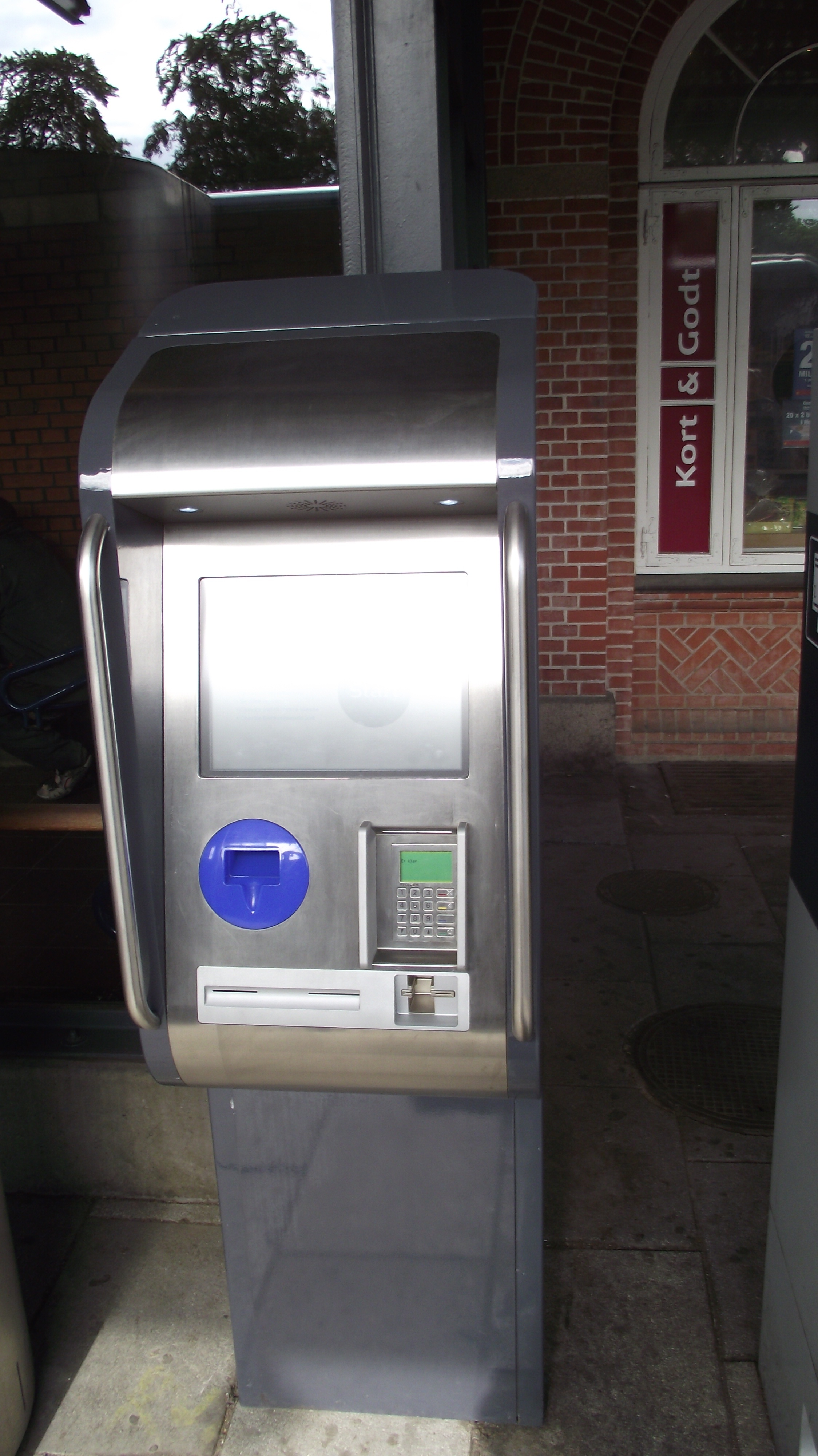 Hoofdstation van Arhus met automaat voor vervoersbewijzen.